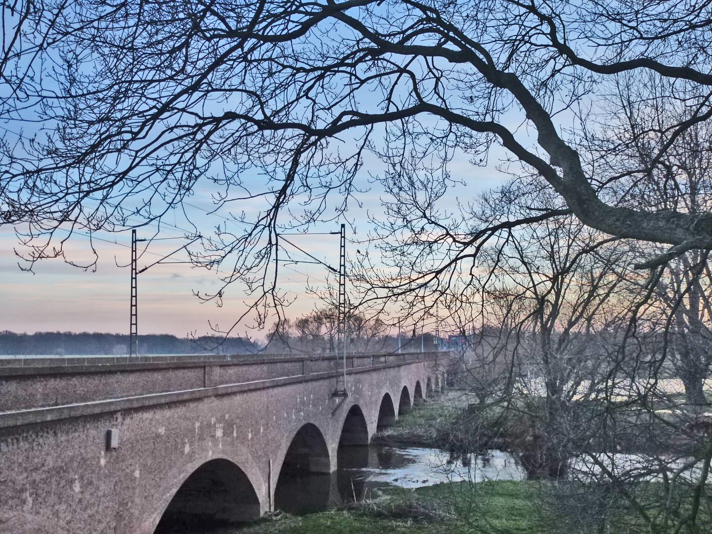 Bahnbrücke über die Steinlache, einem Nebenfluss der Weißen Elster, bei Kollenbey (Gemeinde Schkopau)